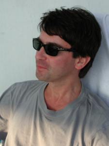 Сергей Шолохов на теплоходе "Assedo" в качестве члена жюри "Мисс пресса России-2001"